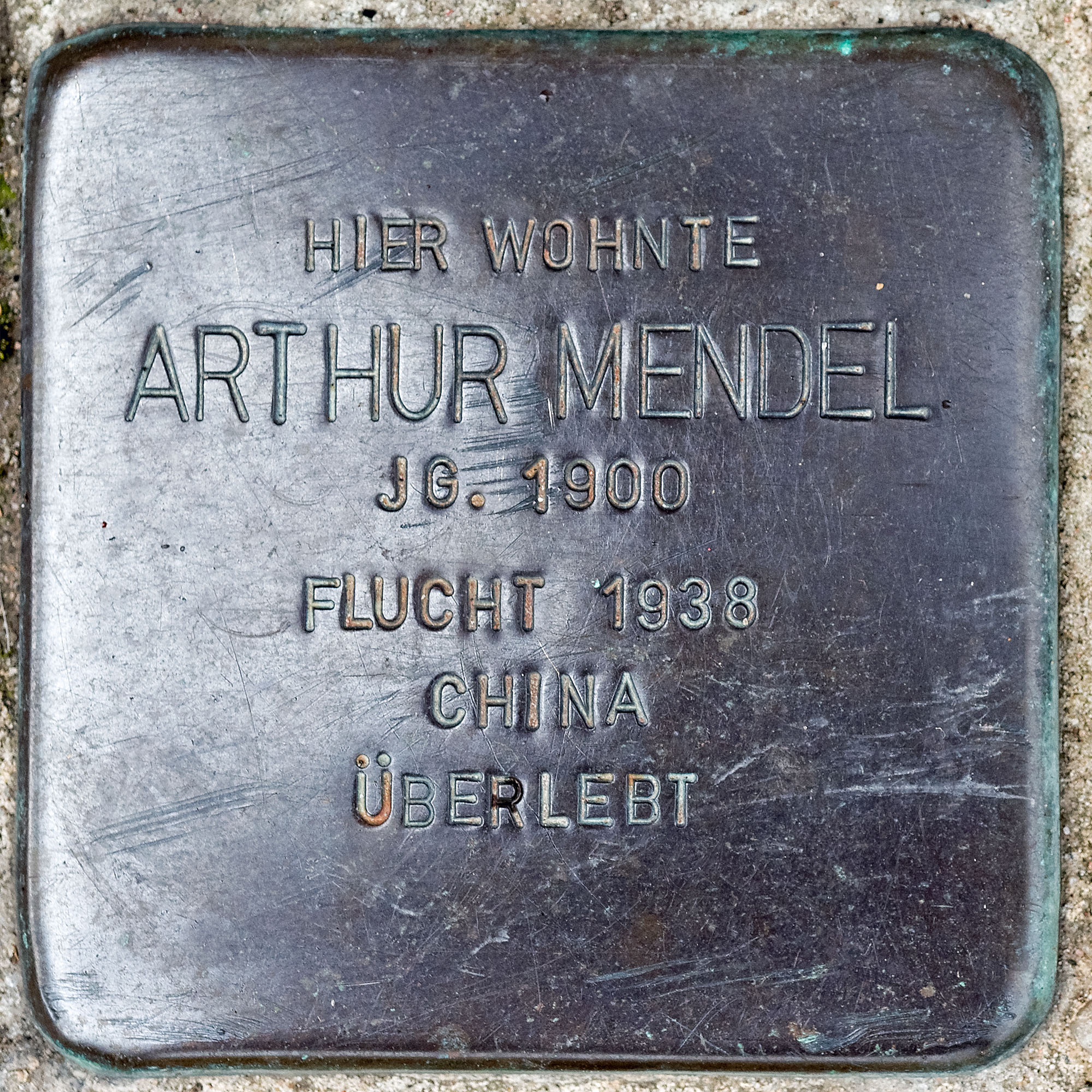 2017 07 16 Stolpersteine Kerken Mendel Arthur